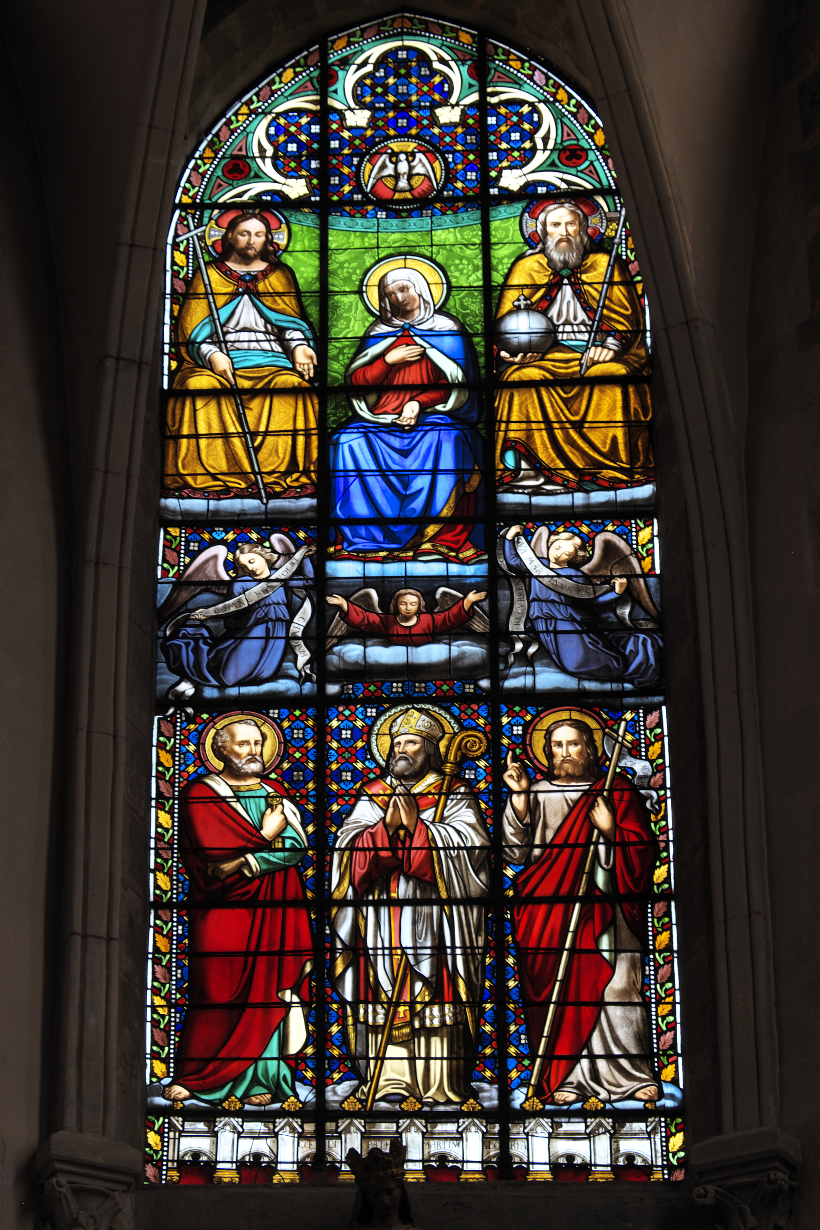 Katholische Pfarrkirche Saint-Martin in Nolay im Département Côte-d’Or (Bourgogne-Franche-Comté/Frankreich), Bleiglasfenster im Chor (Mitte)